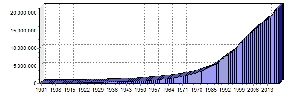 Statystyka członków KADS w latach 1901-2018.